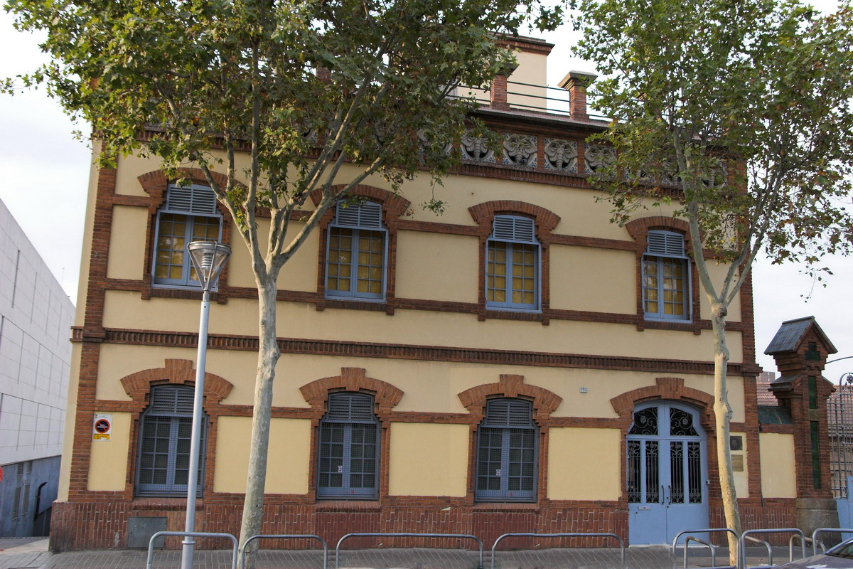 Can VIlumara (l'Hospitales de Llobregat-Catalunya), antiga fàbrica de seda construida en 1907. Actuelament és un Institut d'ensenyament secundàri.